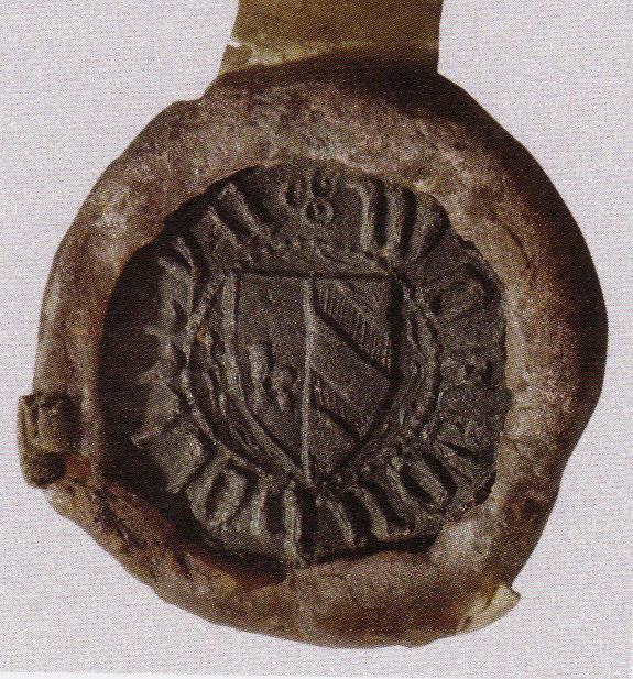 Pečeť Voka IV. z Holštejna